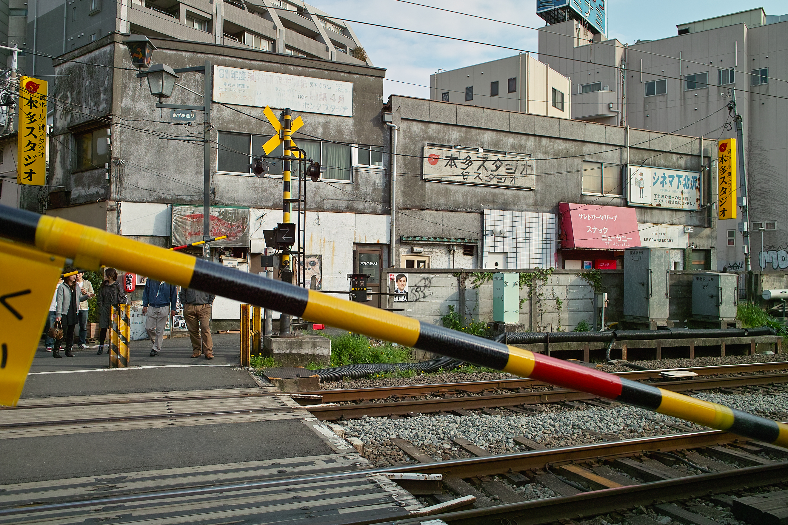 Railroad crossing in Shimokitazawa, Tokyo, Japan